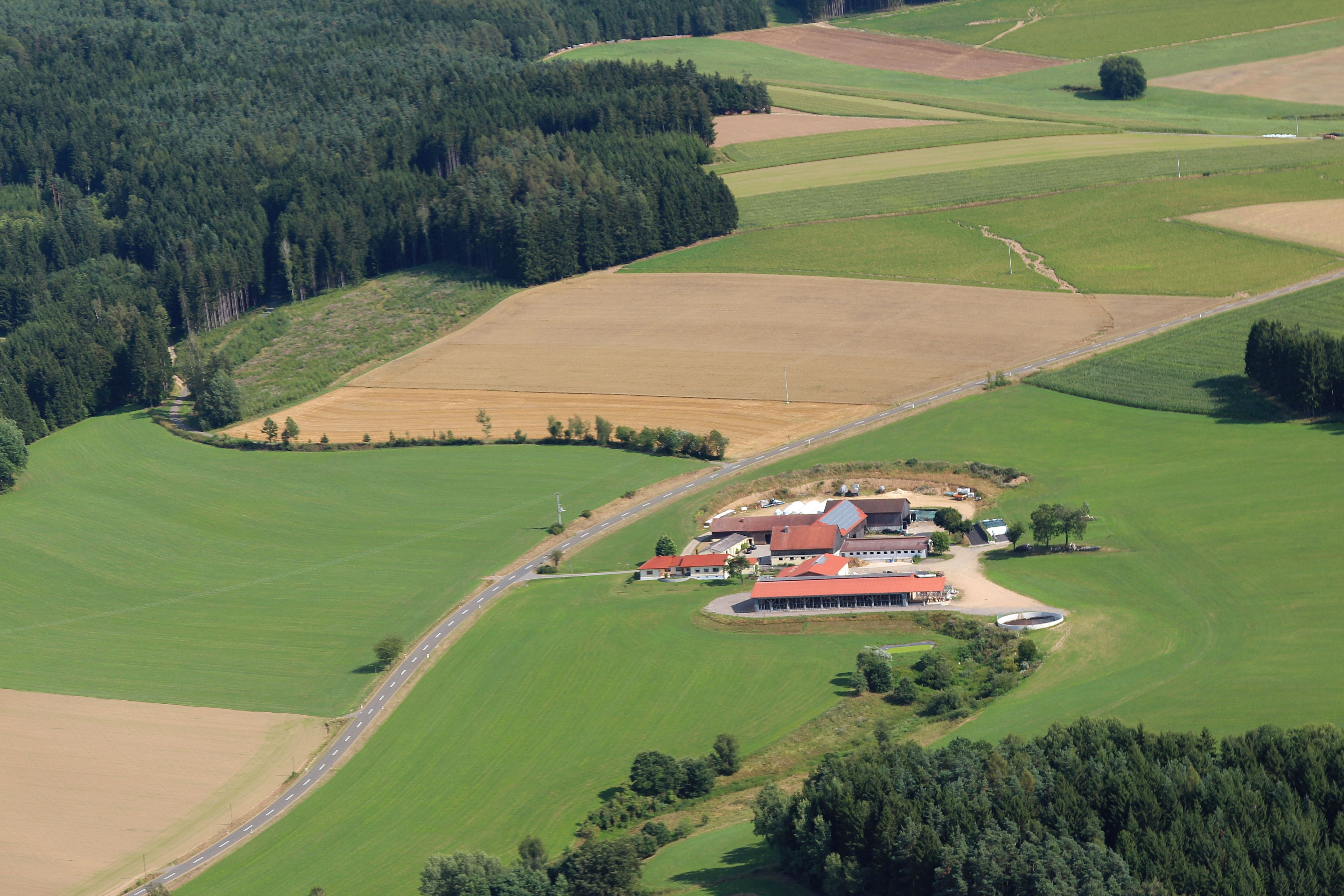 Schwaighof bei Niedermurach, Landkreis Schwandorf, Oberpfalz, Bayern